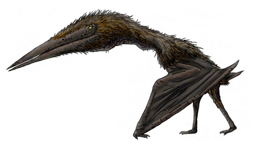 Aerotitan sudamericanus.